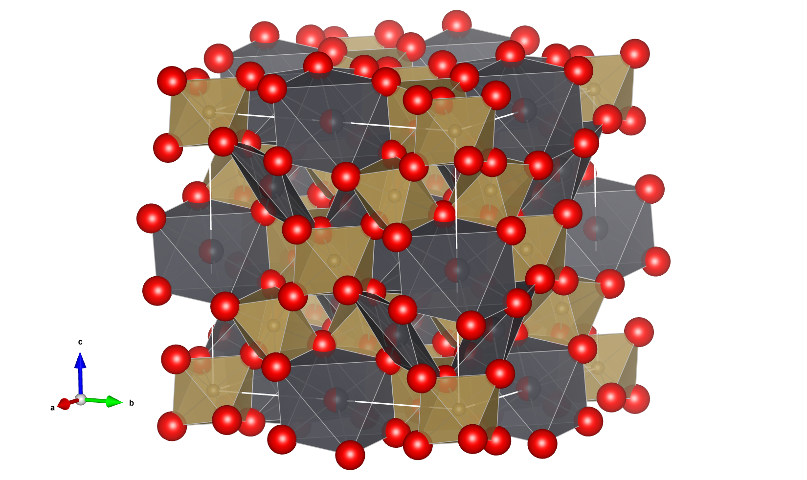 Kristallstuktur von Kenoplumbomikrolith als „Polyeder-Modell“. Erstellt mithilfe des freien Strukturprogramms VESTA und den CIF-Daten von Daniel Groult, Claude Michel und Bernard Raveau Farblegende: BO6-Oktaeder: braun; AO8-Polyeder: grau; Sauerstoff: rot.